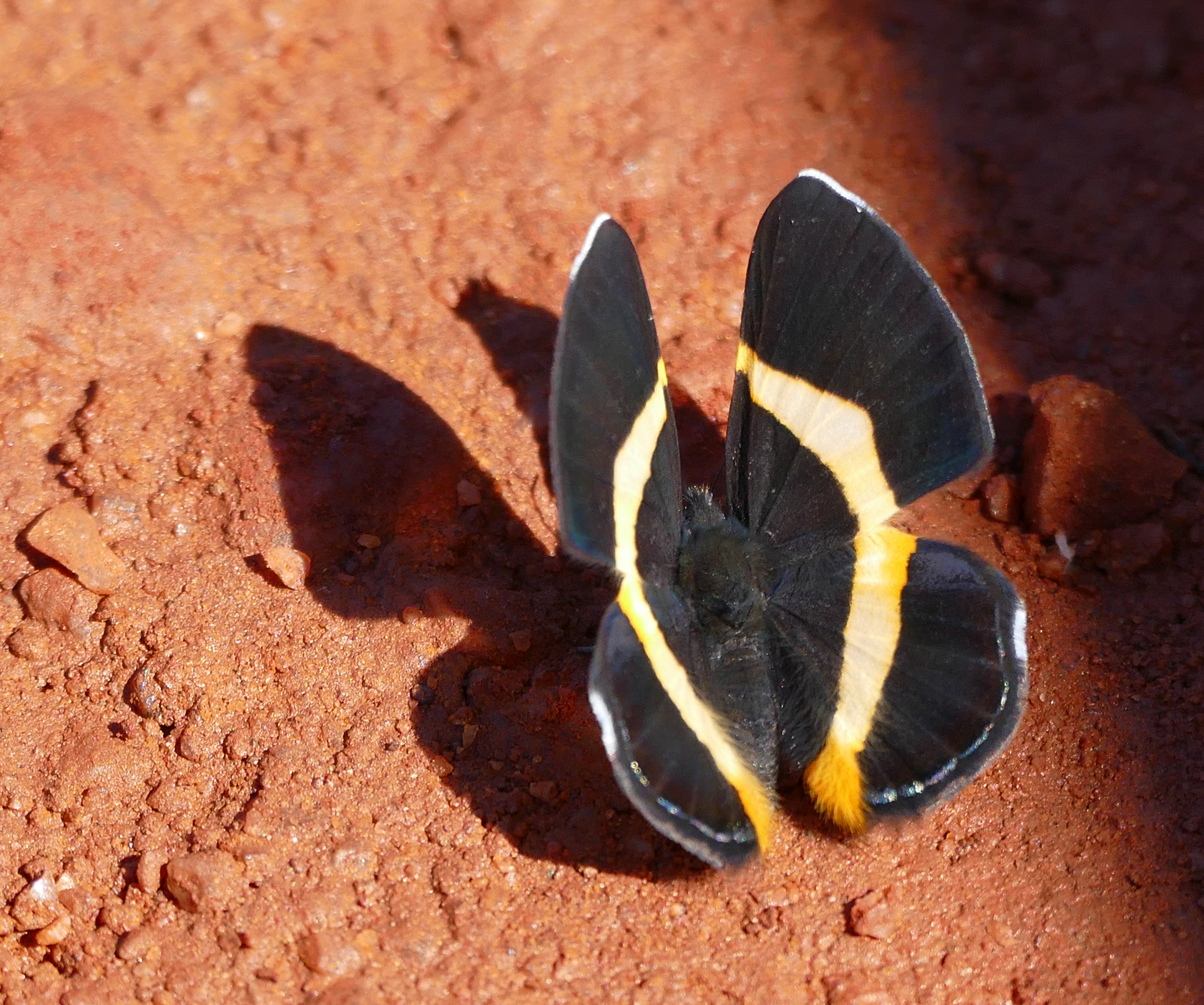 Baia das Pedras access road, Porto Cercado area, Poconé, Mato Grosso, BRAZIL